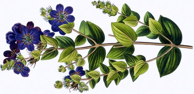 Diplusodon floribundus, inclusa em Plantarum brasiliae icones et descriptiones hactenus ineditae (1826-33), de Johann Baptist Emanuel Pohl. Litografias de Wilhelm Sandler.